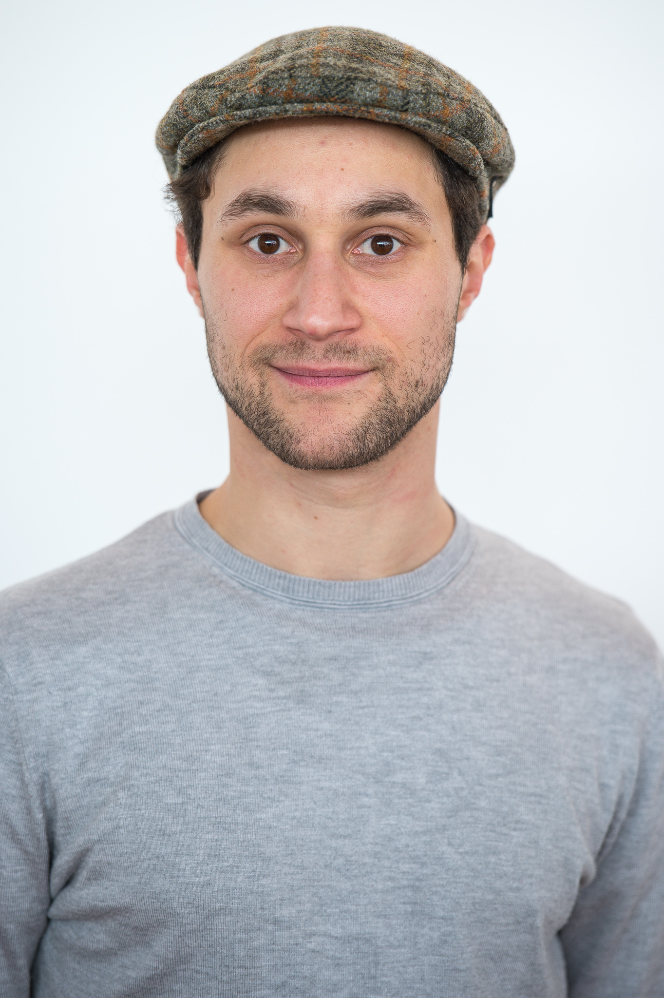 BR,Bayerischer Rundfunk,Bayerisches Fernsehen,Filmbrunch 2017,Ludwig Trepte